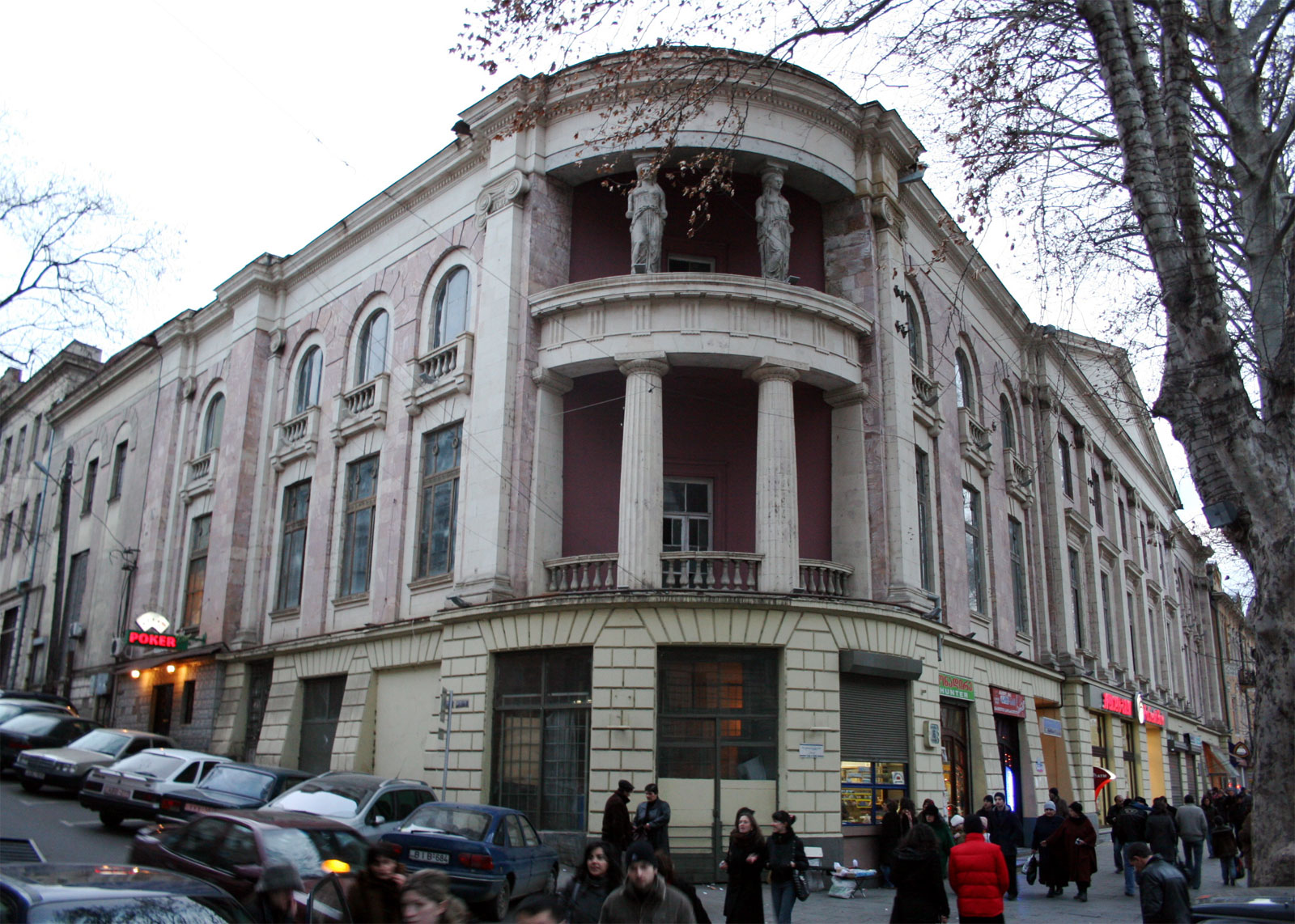 თბილისის ოფიცერთა სახლი. ფოტო: ალსანდრო